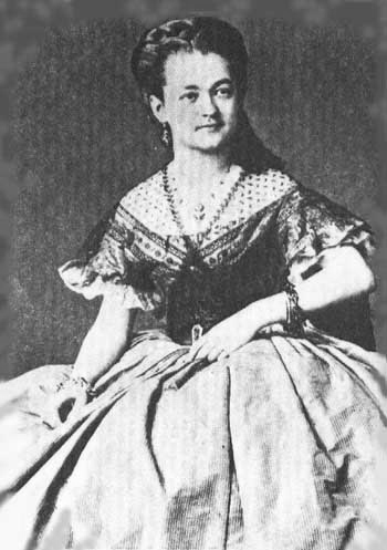 Dolores Cabero Nuñez, esposa del Almirante Miguel Grau Seminario.